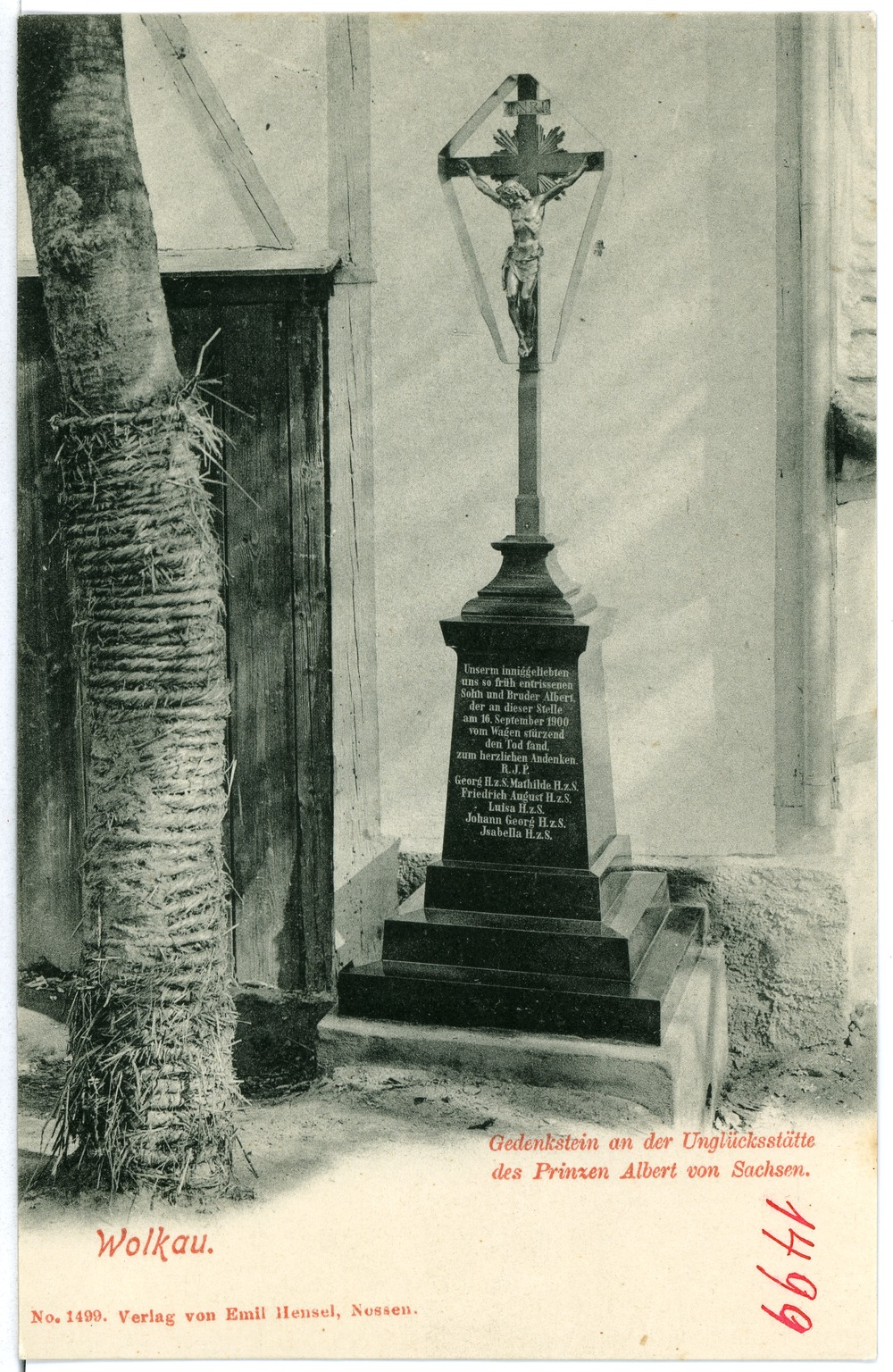 Wolkau; Gedenkstein für Prinz Albert von Sachen, der hier in Wolkau bei Nossen am 16. September 1900 durch einen Verkehrsunfall starb. This postcard is from publisher Brück & Sohn in Meißen ( postcard has a unique number 01499 and is available in a higher resolution at the publisher. This images was uploaded in a cooperation project between Wikipedians and the publisher.